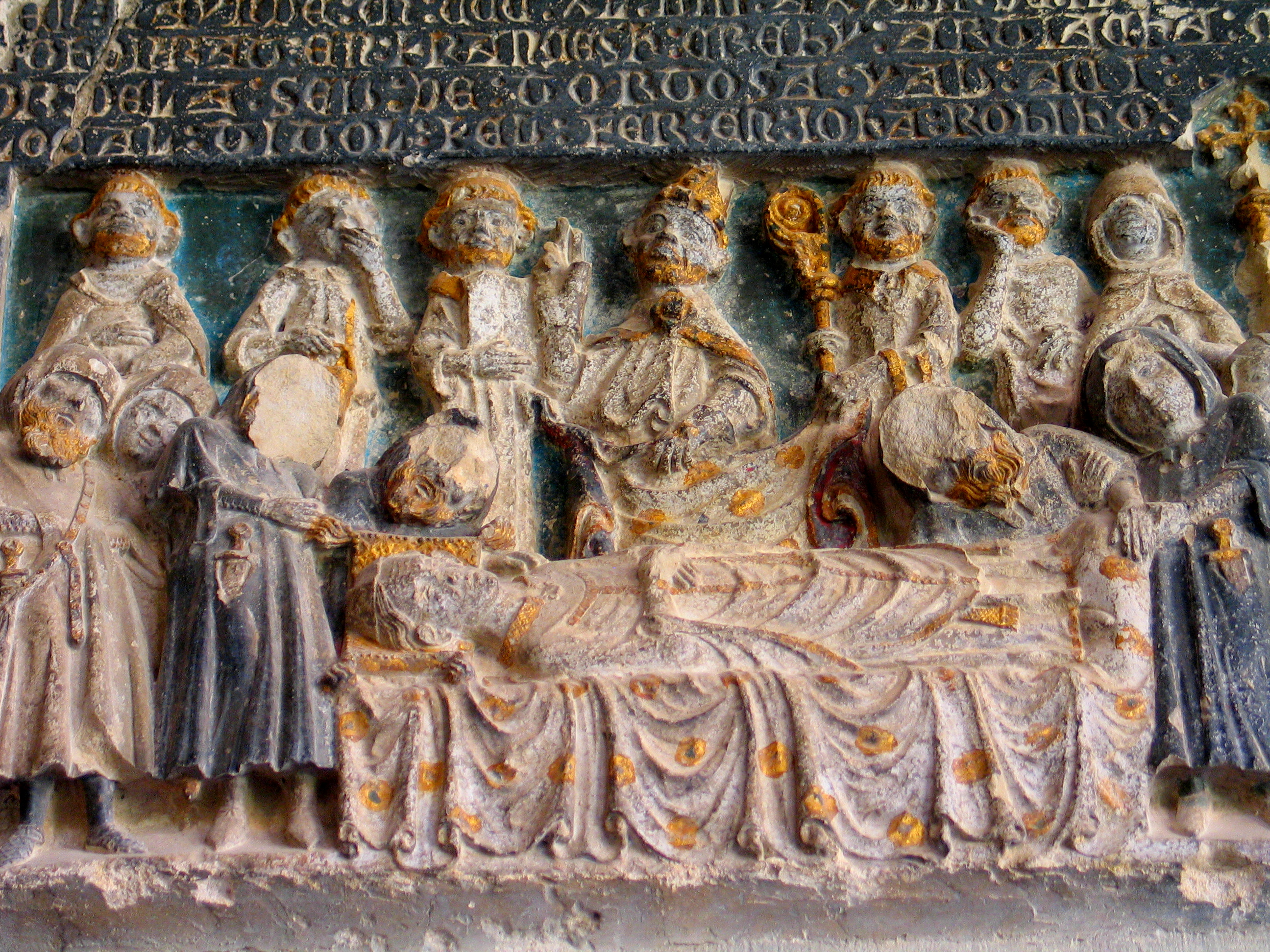 Interior de la catedral de Tortosa